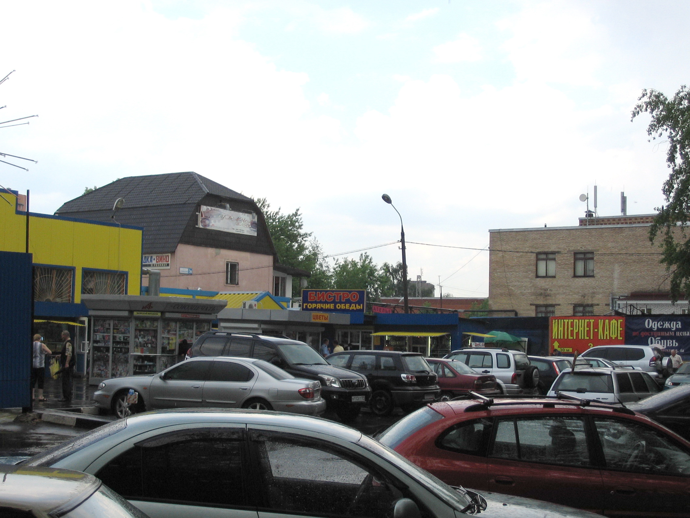 Город Реутов, начало рынка на Ашхабадской улице.